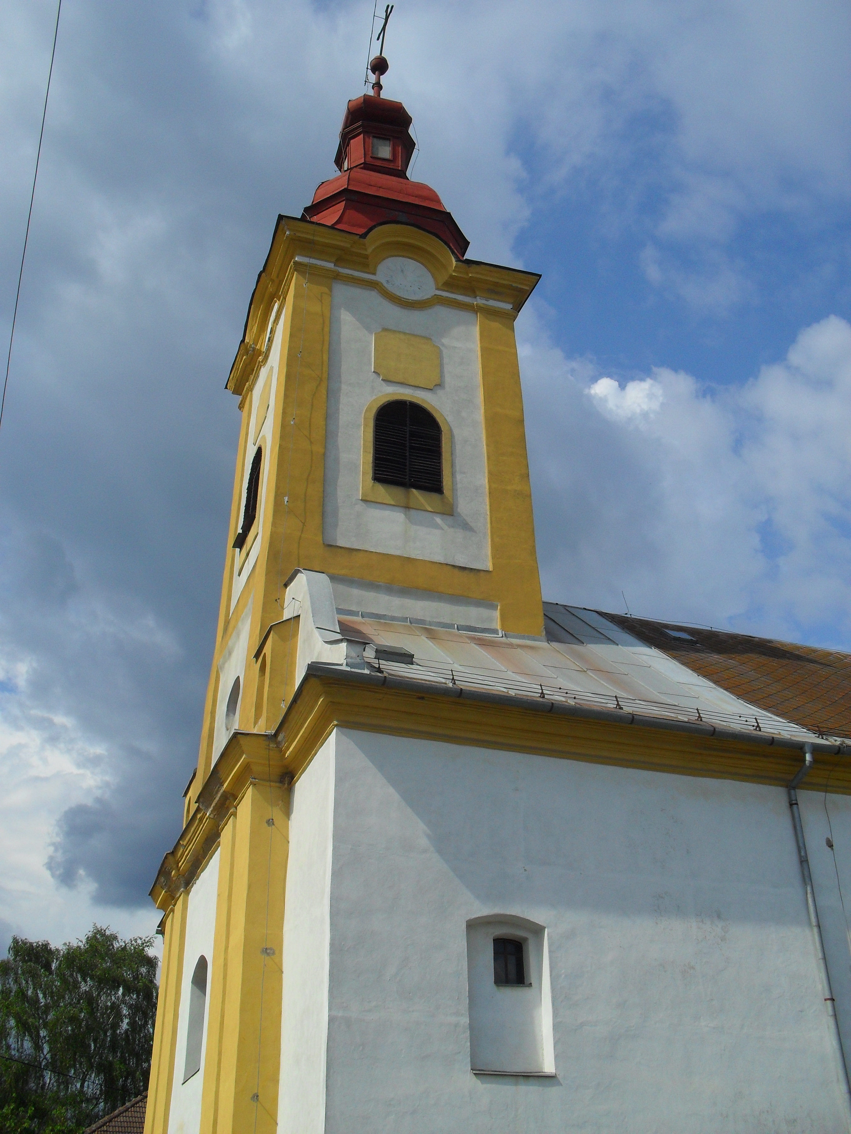 Lice - katolikus templom This medium shows the protected monument with the number 608-10118/0 in the Slovak Republic.